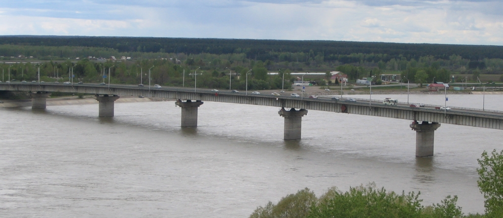 Вид на Коммунальный мост в Томске со стороны Лагерного сада